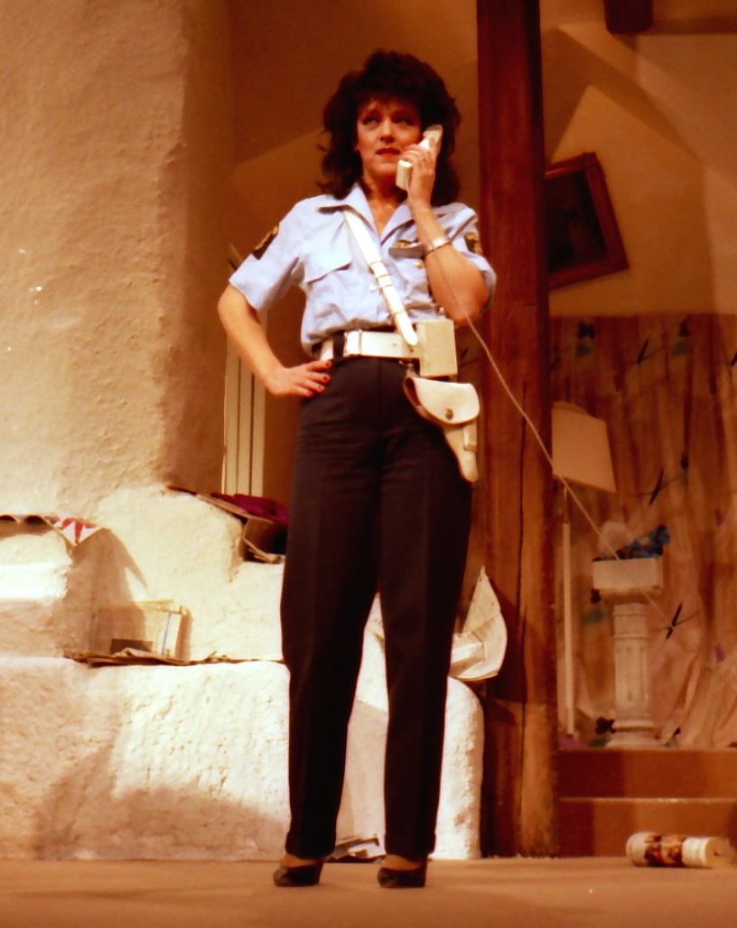 Mona Seilitz som polis i "Omaka par" 1988